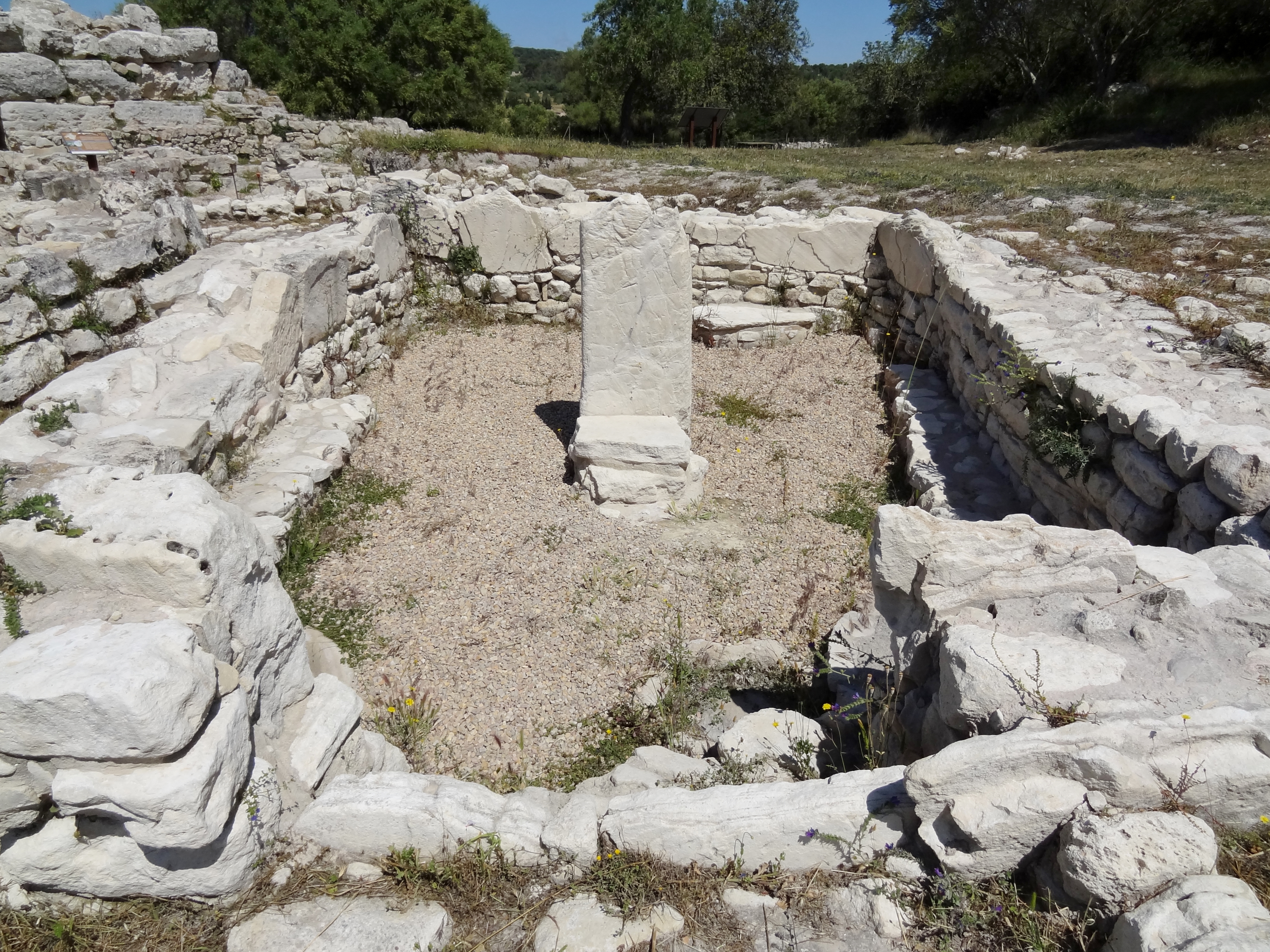 Heiligtum 2 der Ausgrabungsstätte von Son Fornés, Gemeinde Montuïri, Mallorca, Spanien